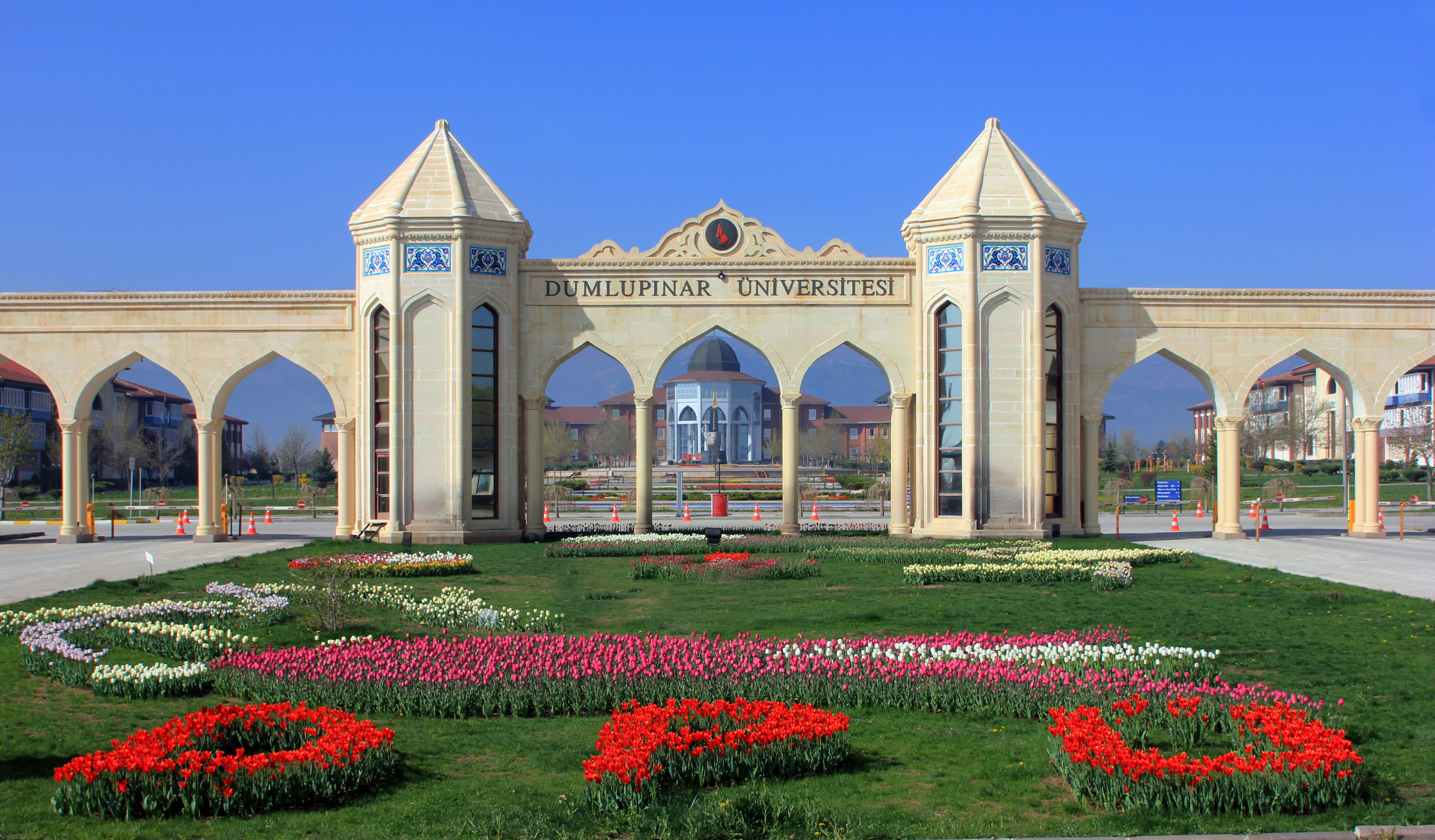 Kütahya Dumlupınar Üniversitesi Evliya Çelebi Yerleşkesi'ndeki Taç Kapı. Arkada Rektörlük binası da görülmektedir.